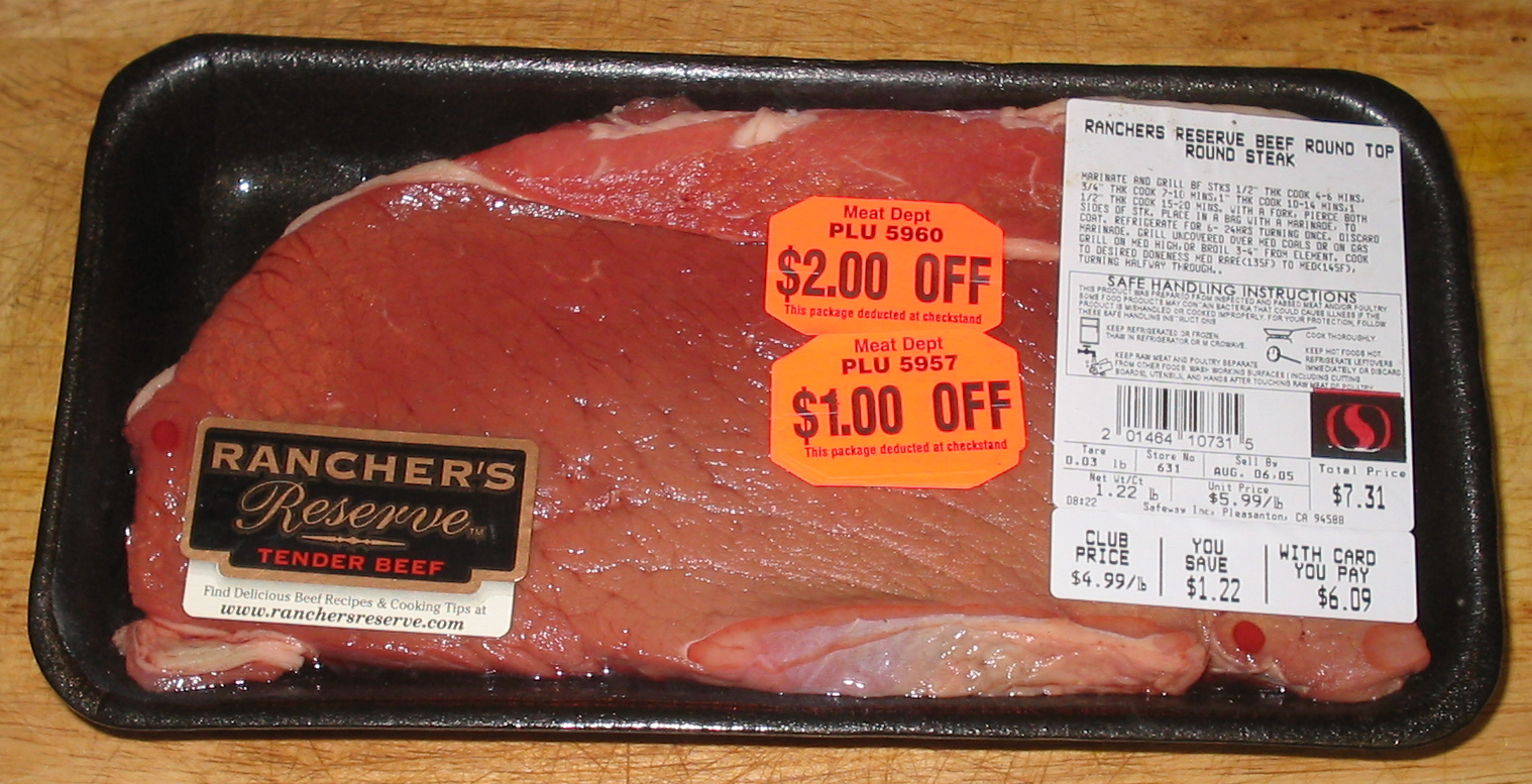 Bandeja de EPS para carne fresca A Rancher's Reserve beef round top round steak from Safeway in its packaging. David Benbennick took this photo on August 6, 2005 at 6:31 PM (August 7 00:31 UTC).